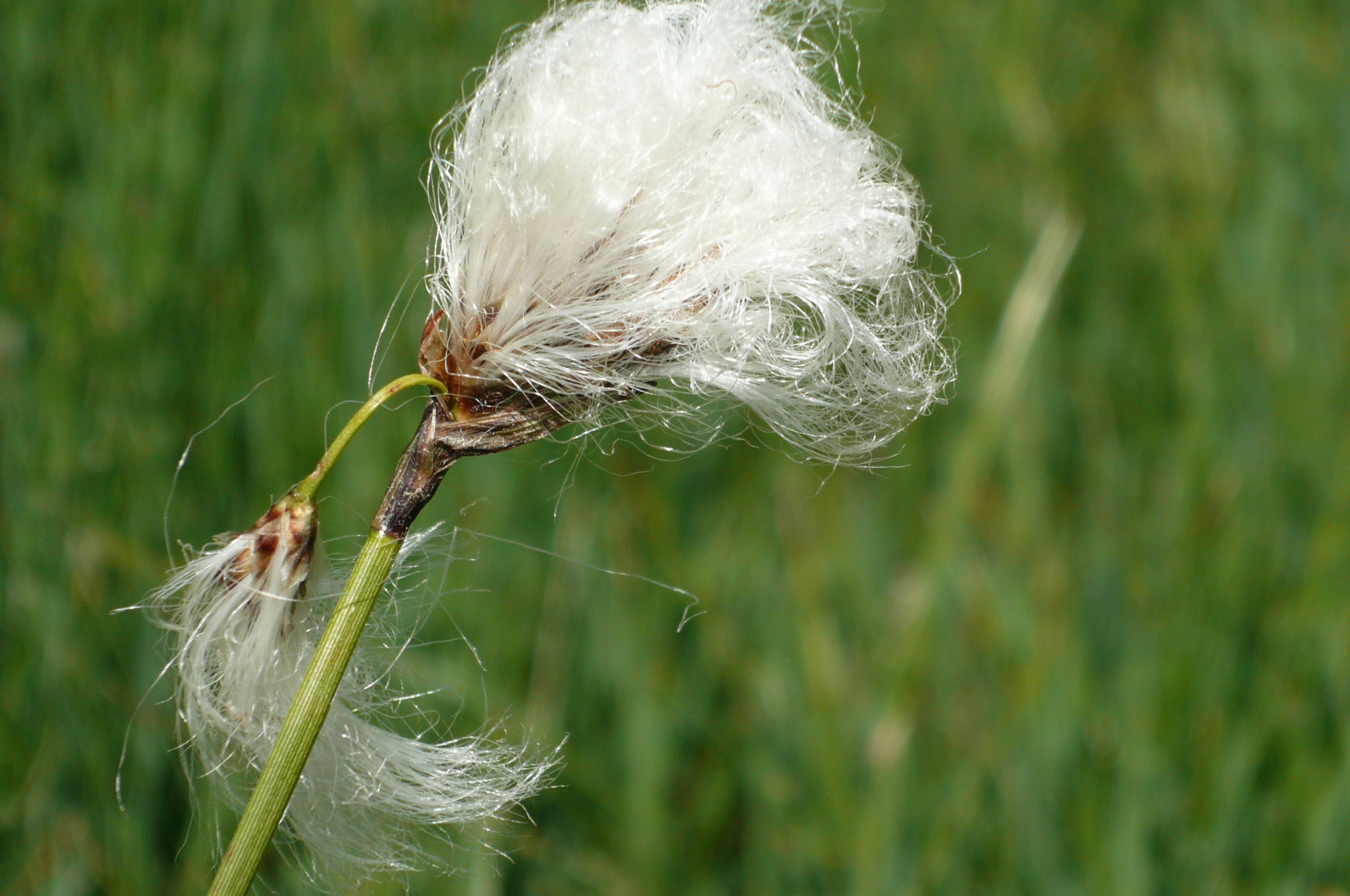 Linaigrette à larges feuilles - Eriophorum latifolium / Photo prise sur la Commune de Saint-Véran (Hautes-Alpes).